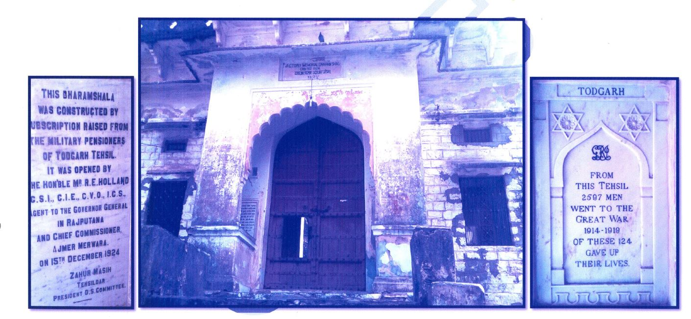 टॉडगढ